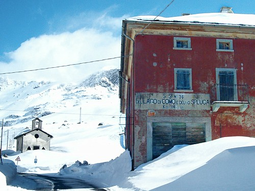 Splügenpas